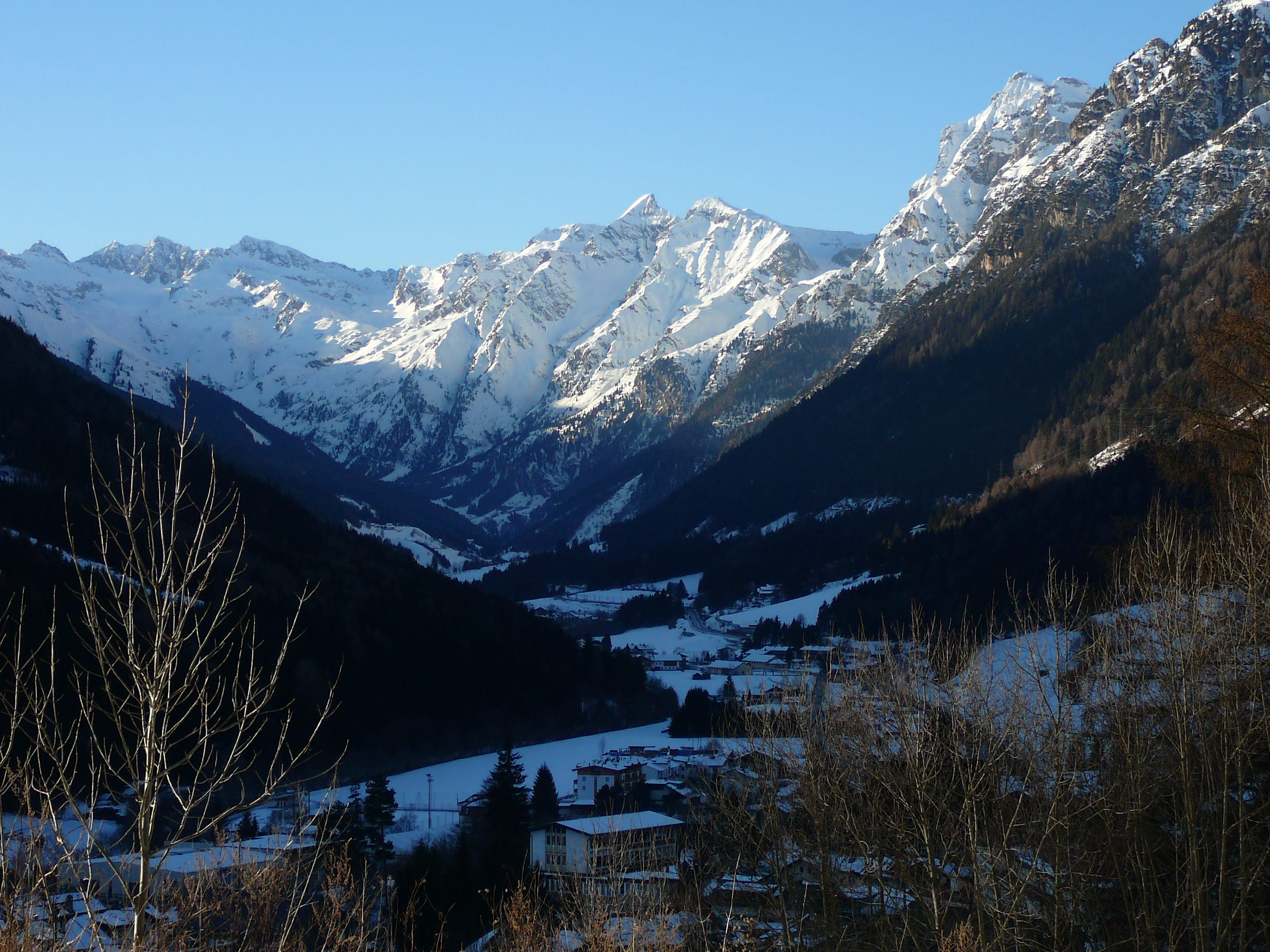 Val di Fleres